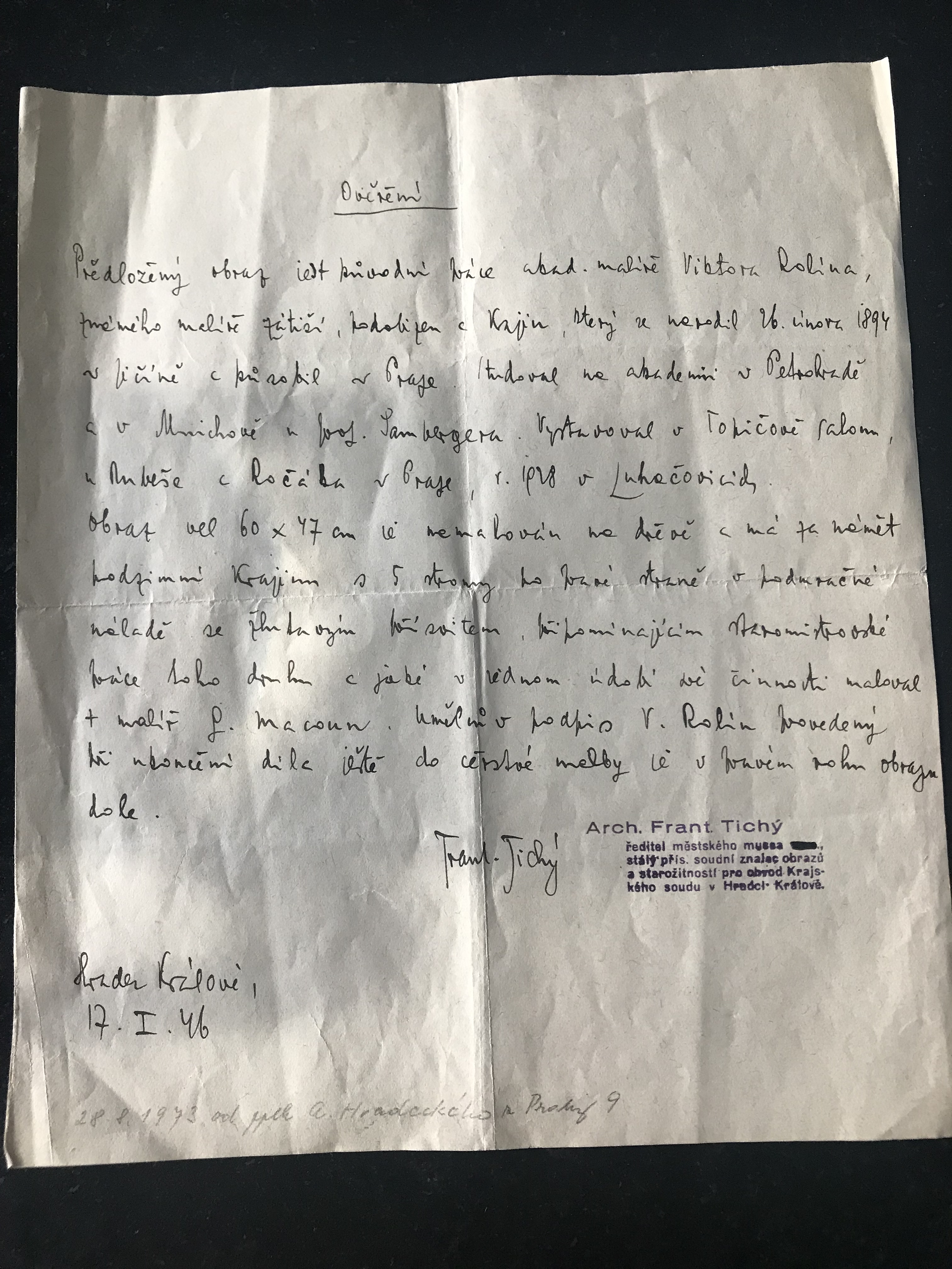 Znalecký posudok na obraz od Viktora Rolína z roku 1946